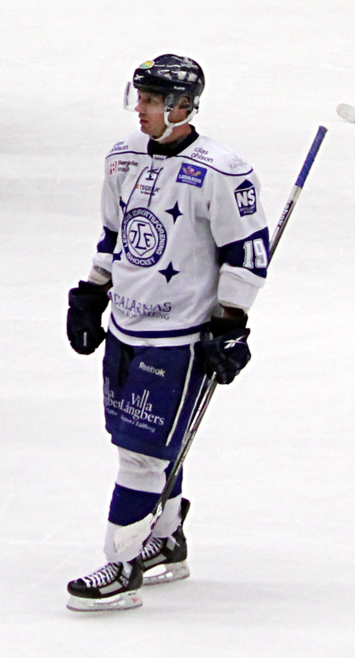 Jared Aulin för Leksands IF mot VIK Västerås HK 29 januari 2011.